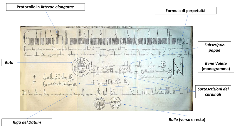 Analisi delle caratteristiche principali di un privilegio solenne papale. Esempio tratto dall'immagine